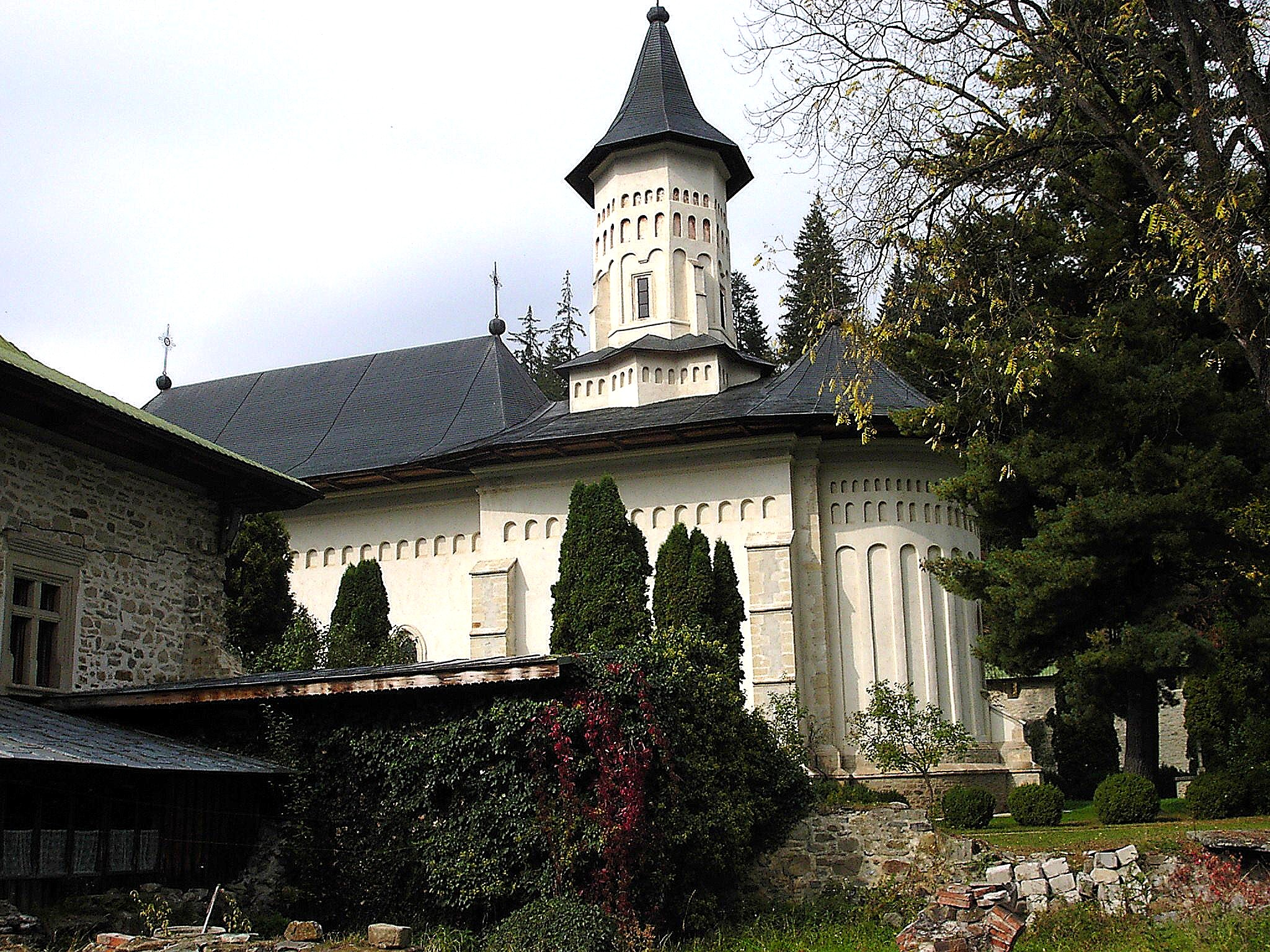 Slatinai kolostortemplom, Románia